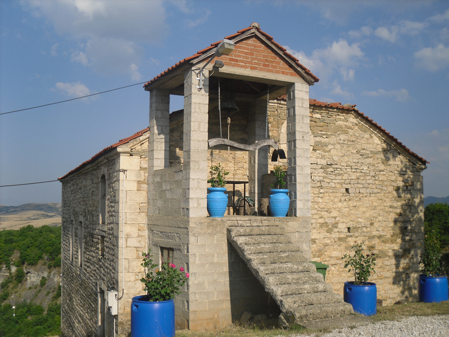 Манастирот „Свети Архангели“, Чука